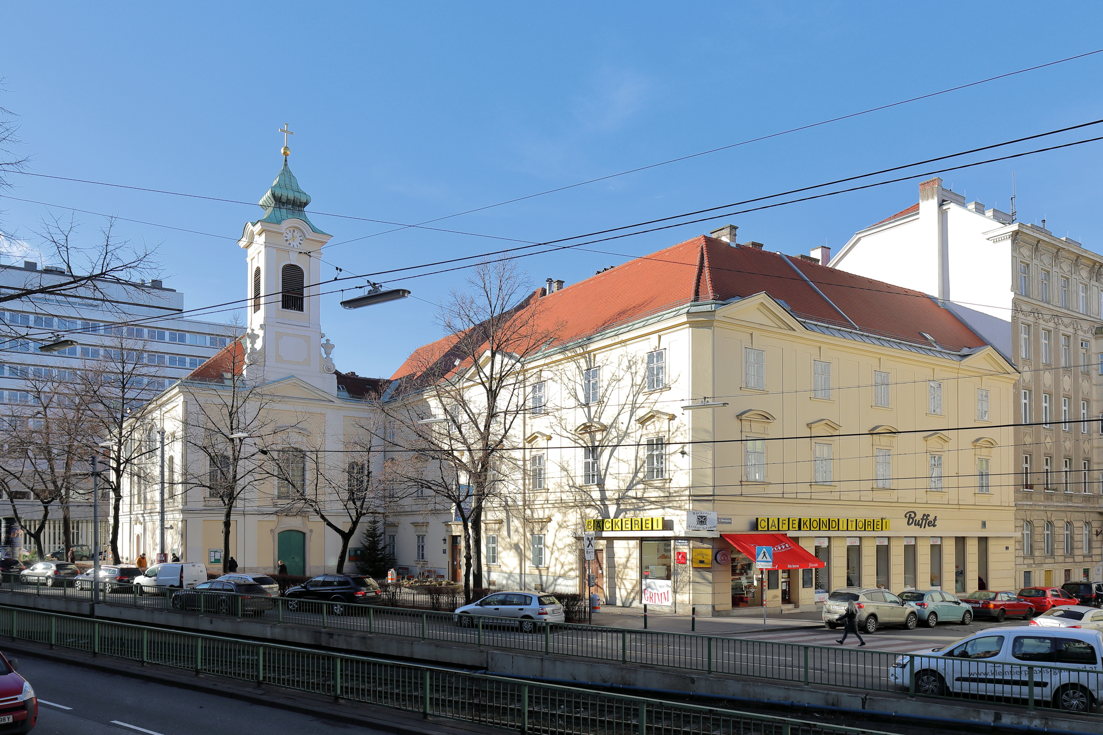 Ostansicht des Klostergebäudes und der röm.-kath. Filialkirche St. Thekla, auch Piaristenkirche bzw. Theklakirche bezeichnet, im 4. Wiener Bezirk Wieden.1751/52 kauften die Piaristen (ein Schulorden) das Grundstück. Im Anschluss wurde darauf ein Ordenshaus mit Kirche und angeschlossener Schule nach Plänen von Matthias Gerl errichtet. Die Kirchweihe erfolgte am 26. September 1756 und als Kirchenpatronin fungierte die hl. Thekla. Bereits 1788 wurde der nordöstliche Teil (Vorderteil) des Kloster-Gebäudekomplexes verkauft.